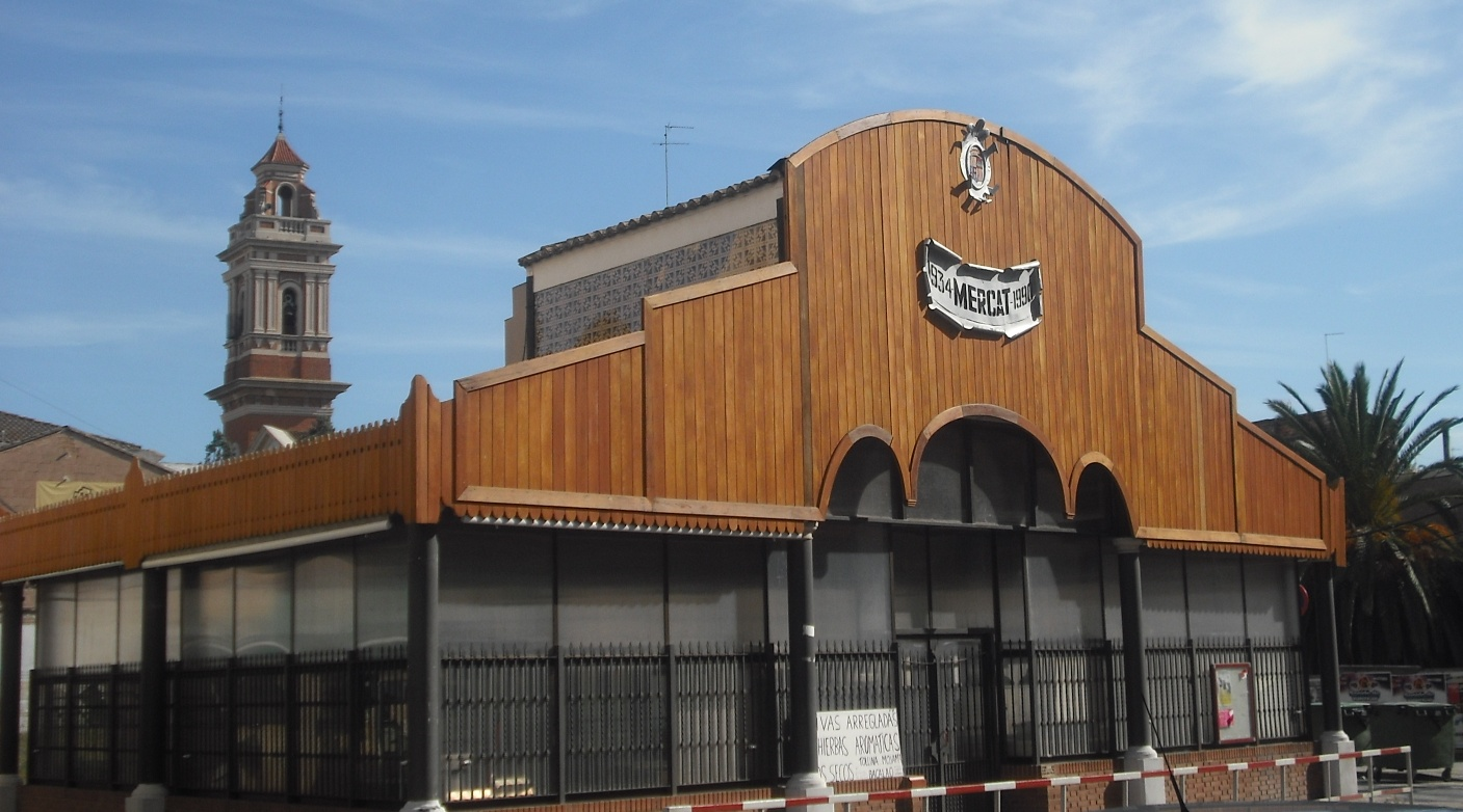 Mercat de Tavernes Blanques.